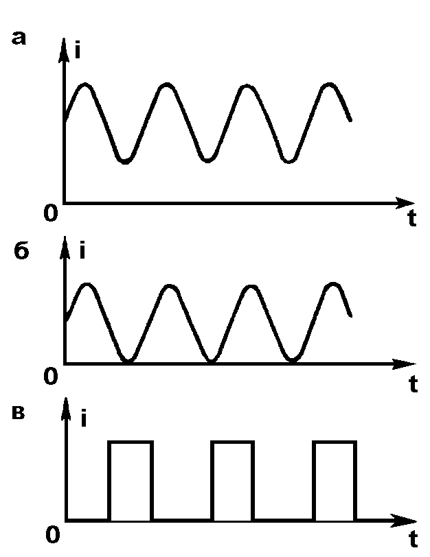 Графики различных видов пульсирующих токов